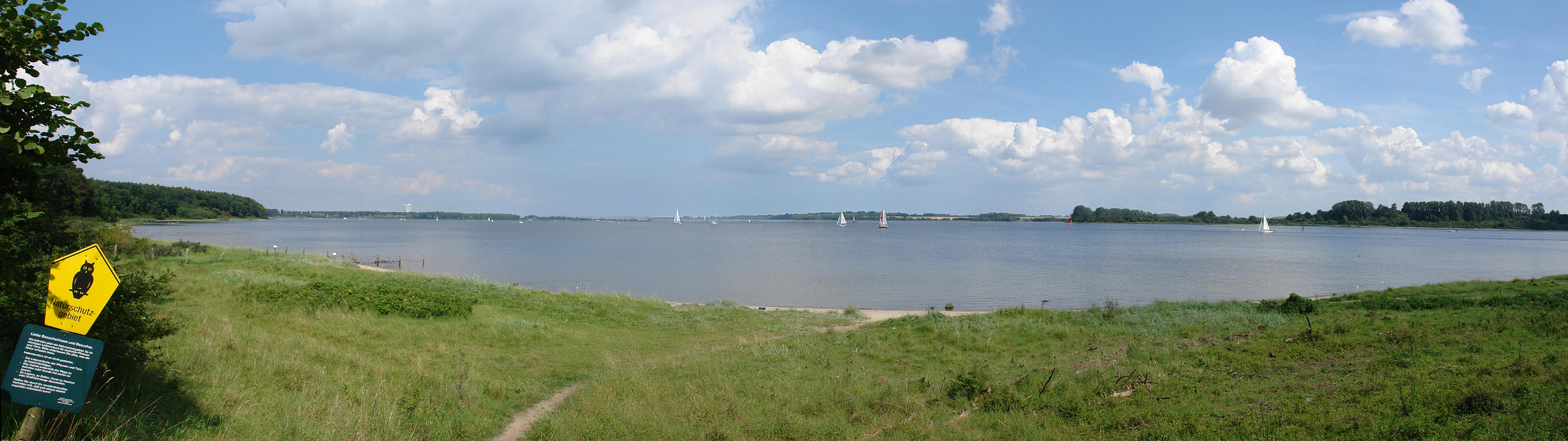 Stülper Huk im Naturschutzgebiet „Dummersdorfer Ufer“. Blick auf Priwall, Pötenitzer Wiek (Panorama aus drei Aufnahmen)